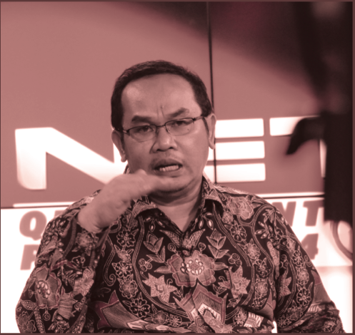 Foto Saiful Mujani